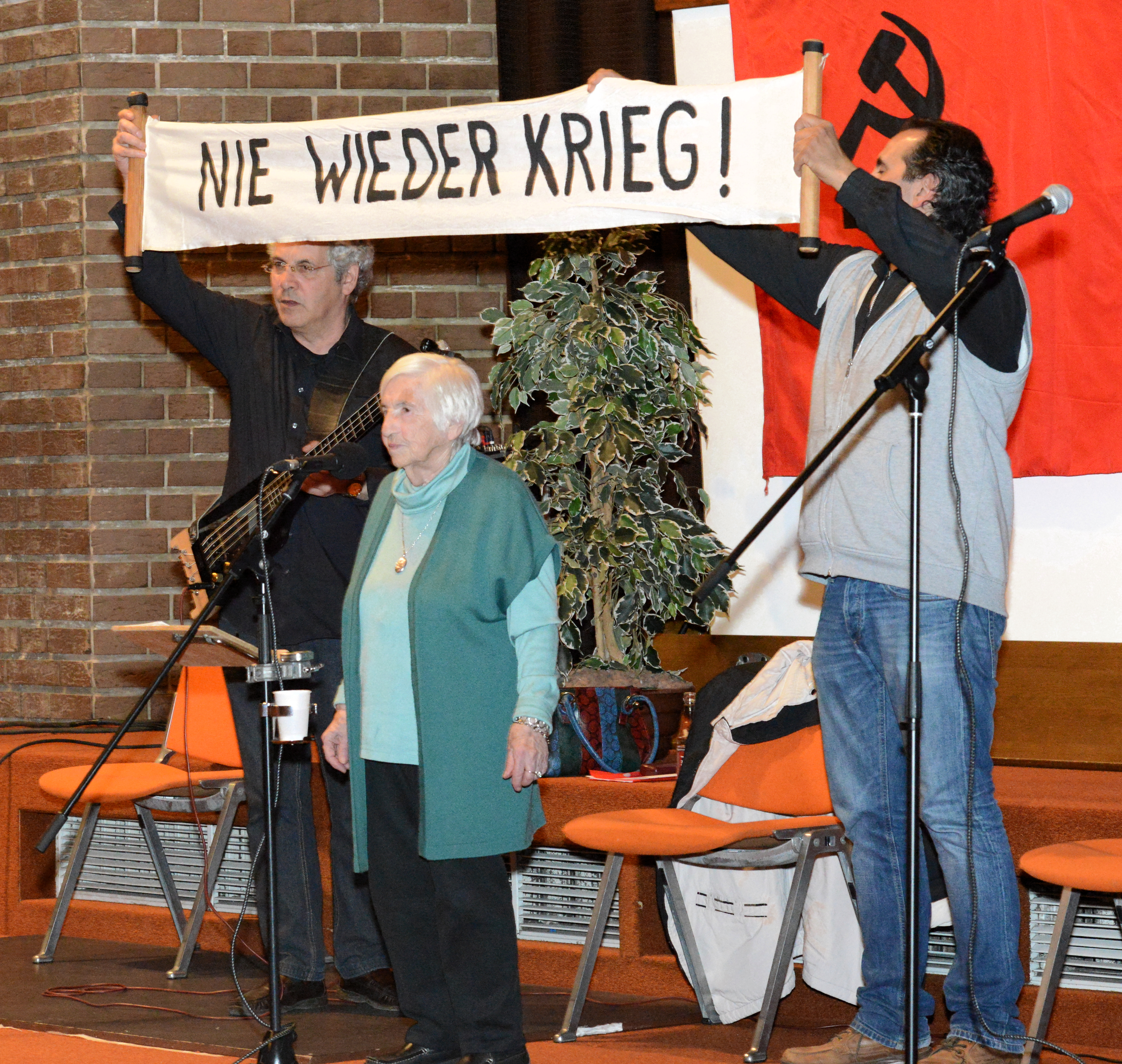 Den 29. Abrëll 2015 hat d'Kommunistesch Partei Lëtzebuerg op en Owend zum Thema 70 Joer Befreiung vum Faschismus agelueden.Am Kulturzentrum Marcel Noppeney zu Uewerkuer ass déi bekannt antifaschistesch Aktivistin Esther Bejarano zesumme mat hirem Jong Joram an dem Rapper a Sozialaarbechter Kutlu Yurtseven vu Microphone Mafia opgetrueden. De Joram an d'Esther Bejarano zesumme mam Kutlu Yurtseven.